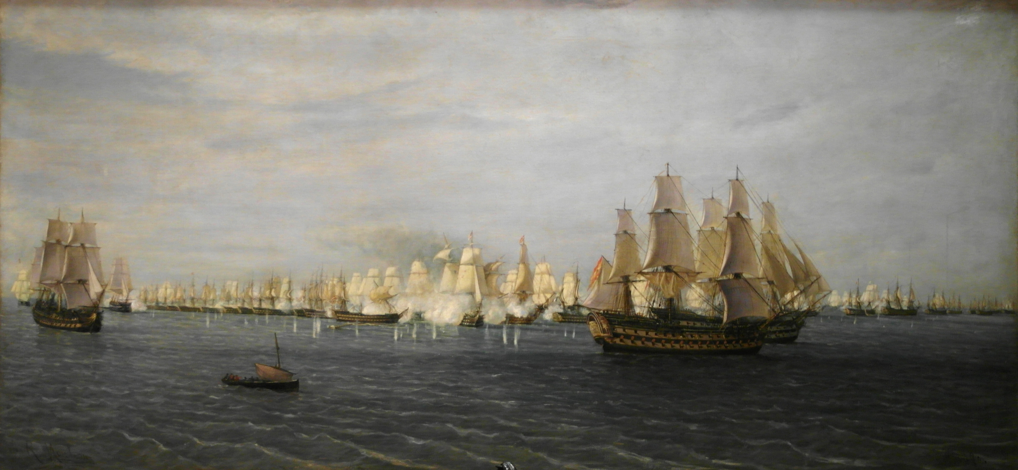 El lienzo representa el momento en que la escuadra inglesa avanza formada en dos grupos cerrados contra la flota francoespañola durante la batalla de Trafalgar, que quedó dividida en dos partes y perdió la mayoría de sus buques.